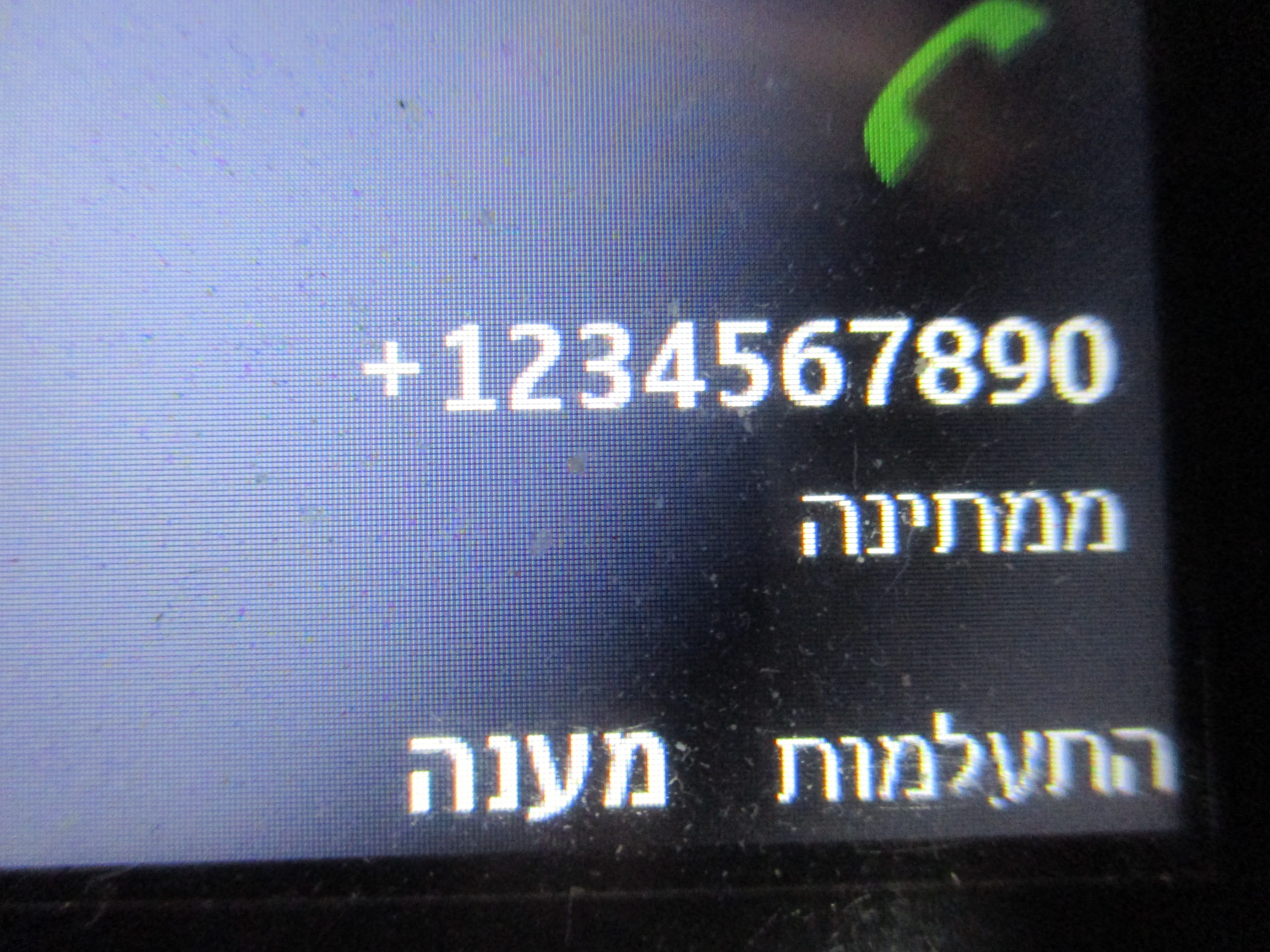 שיחה מזוהה בממתינה